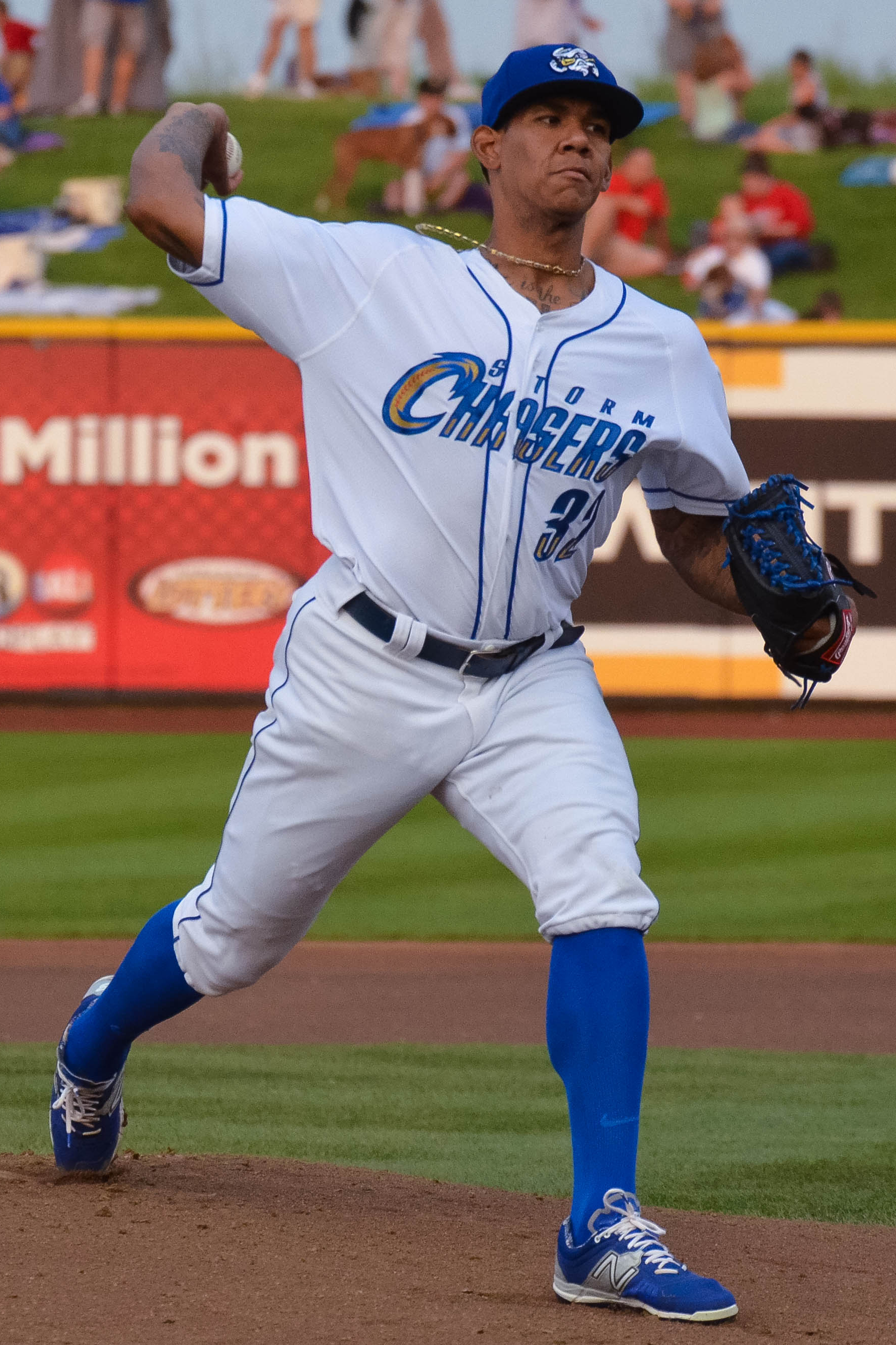 J. C. Sulbaran